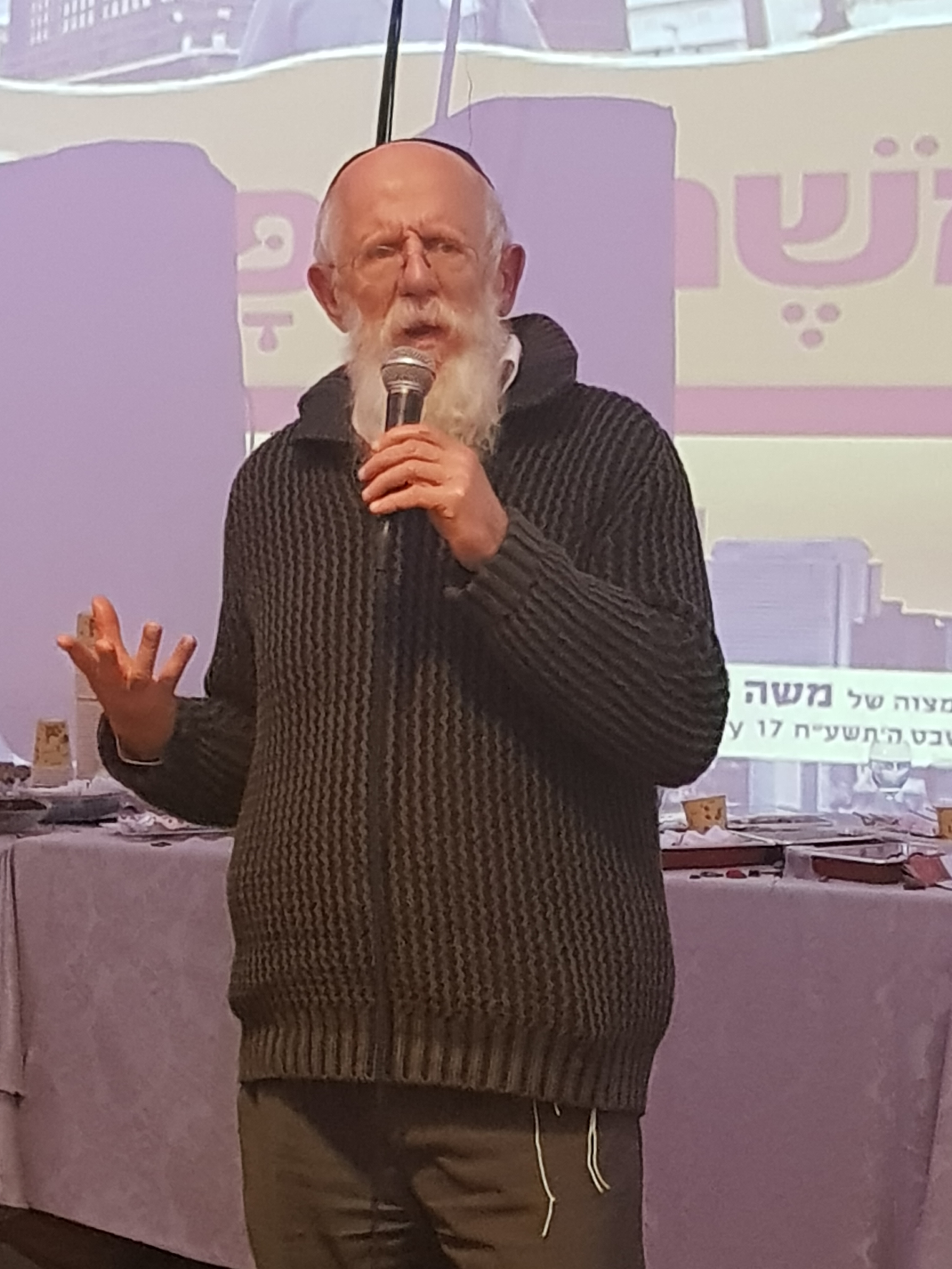 יעקב מדן 2018.